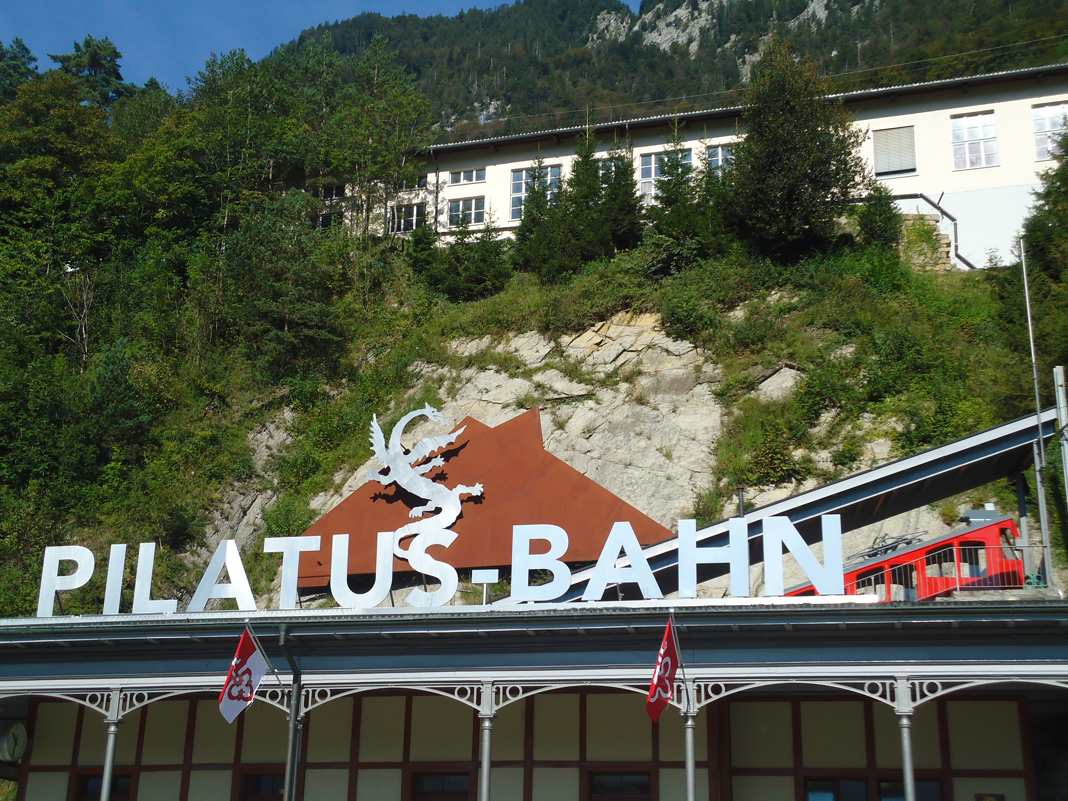 Steilste Zahnradbahn der Welt von Alpnachstad zum Pilatus hoch